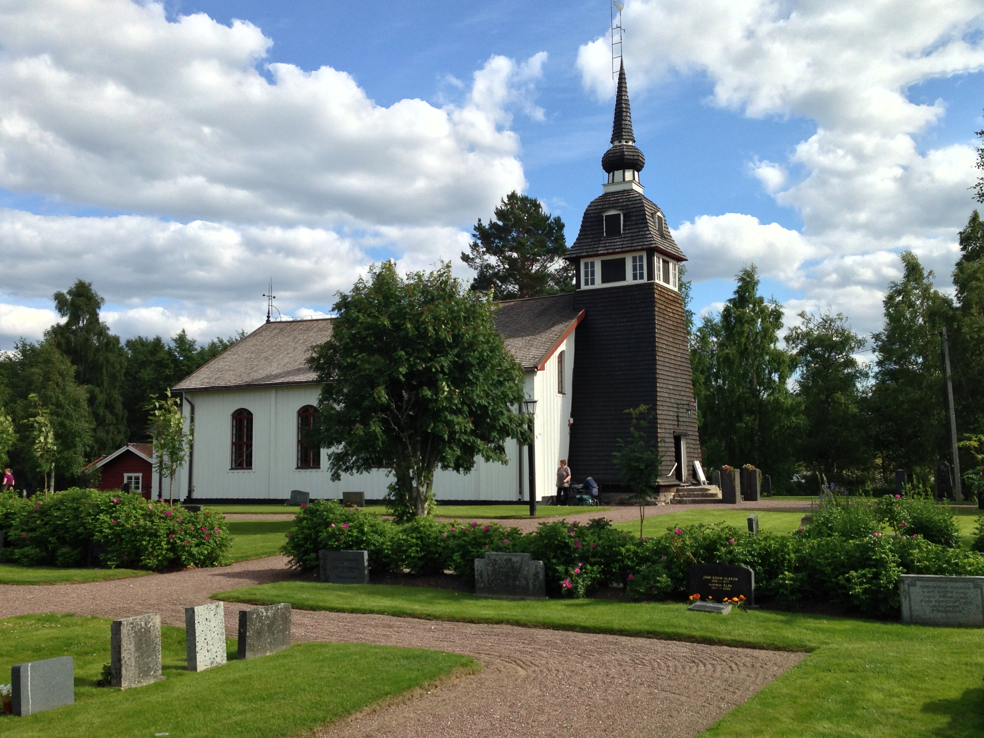 Bingsjö kyrka 2013